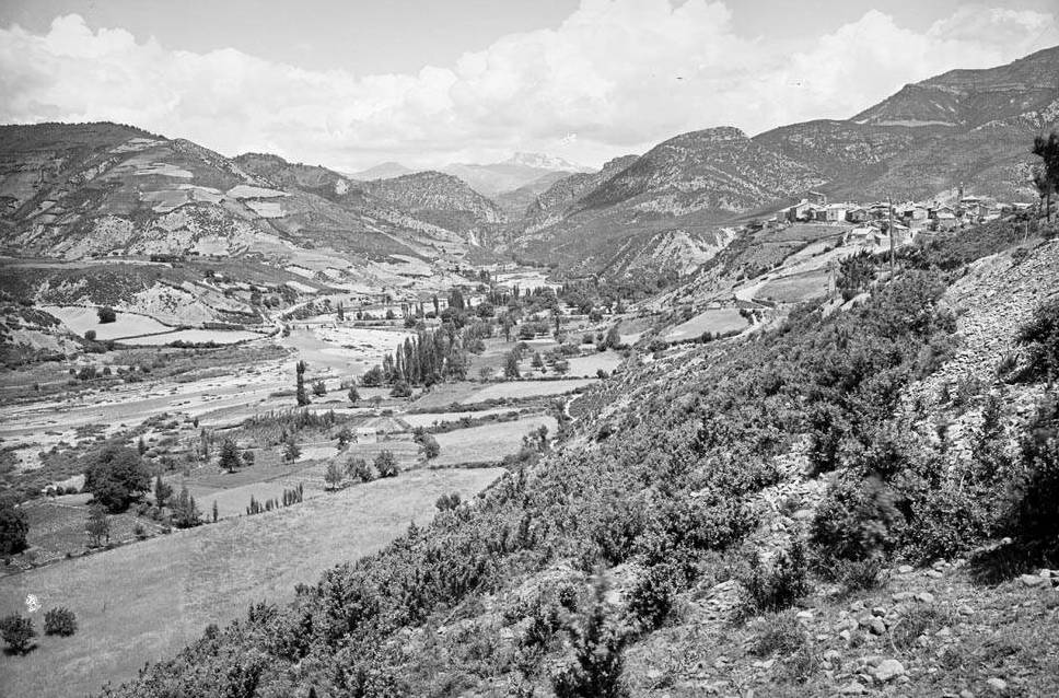 Imatge